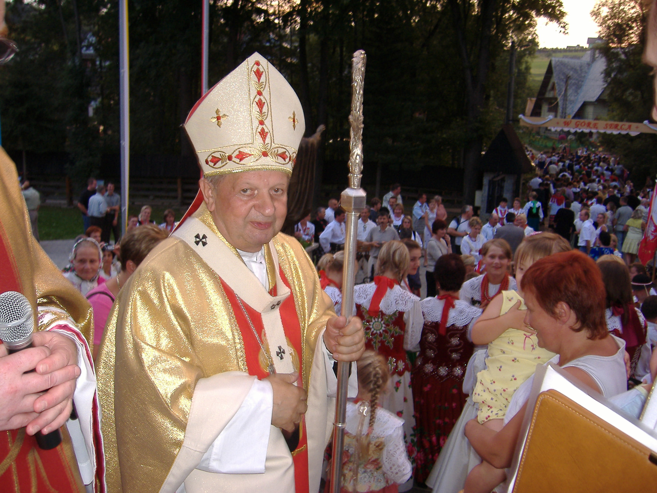 J. Em. Ks. Kard. Stanisław Dziwisz podczas uroczystości poświęcenia pomnika Sługi Bożego Jana Pawła II w Groniu (21 VII 2006). Autor: Leszek Para (na wikipedii settembrini)